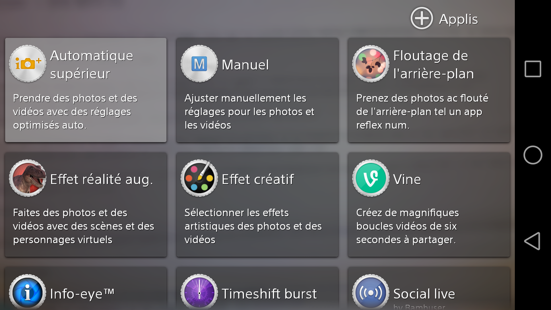 Les micro applis pour l'appareil photo du Sony Xperia Z1